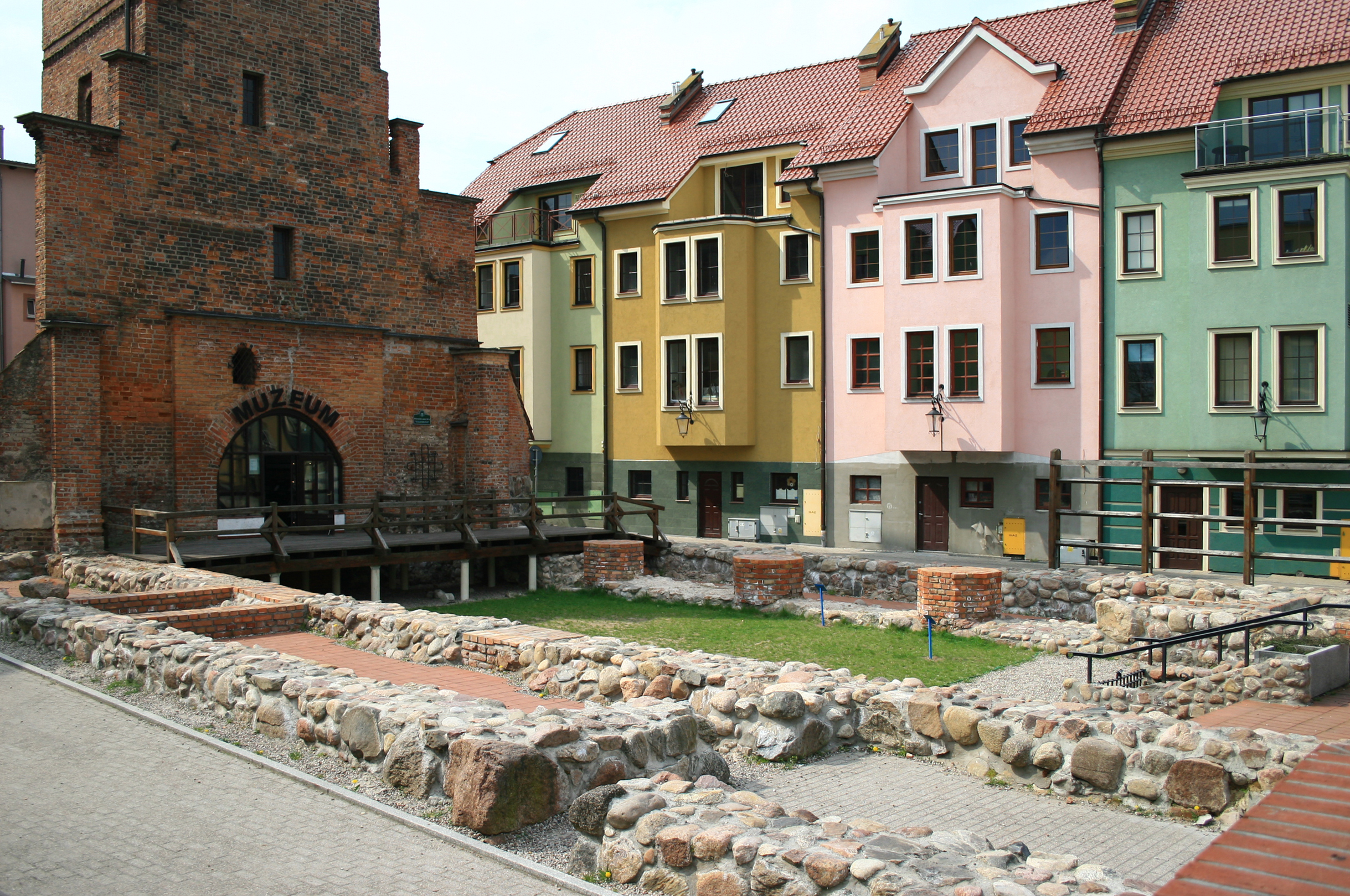 Bytów, ul. Jana Pawła II - kościół p.w. Św. Katarzyny, obecnie wieża i fundamenty (zabytek nr 338 i A-365 z 16.08.1965)